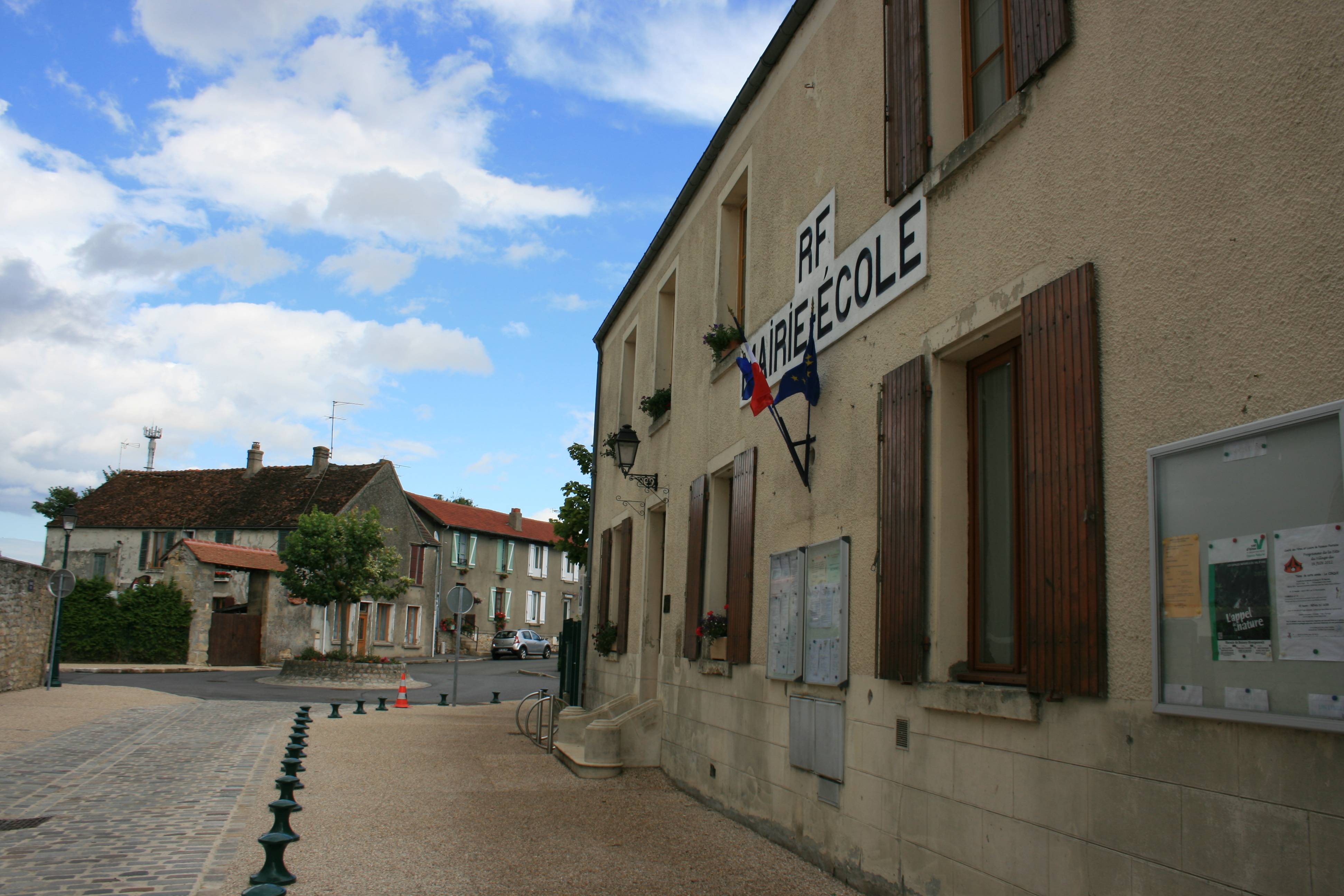 Mairie Ecole de Puiseux-Pontoise, dans la Grand-rue